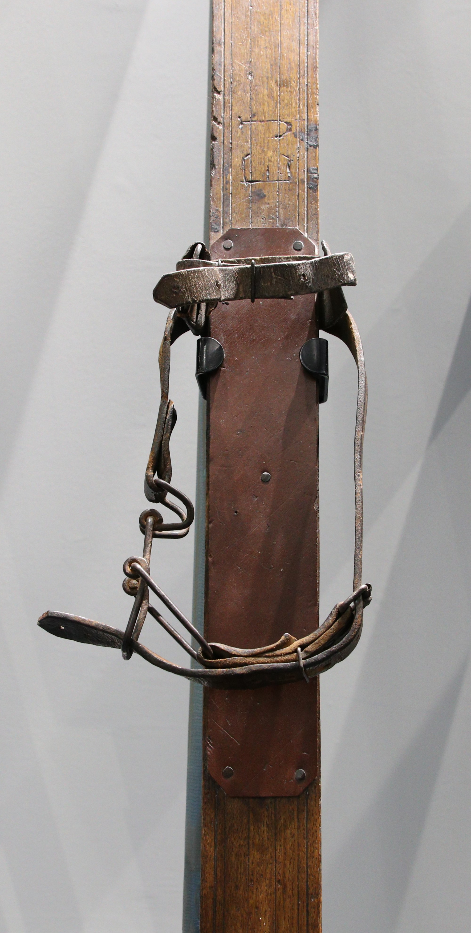 Détail de ski en bois du début du XXe siècle de Henri Duhamel (1853-1917), Coll. Musée dauphinois. Exposé au Musée dauphinois de Grenoble pour l'exposition de longue durée "Le rêve blanc. L'épopée des sports d'hiver dans les Alpes" au Musée dauphinois, Grenoble.